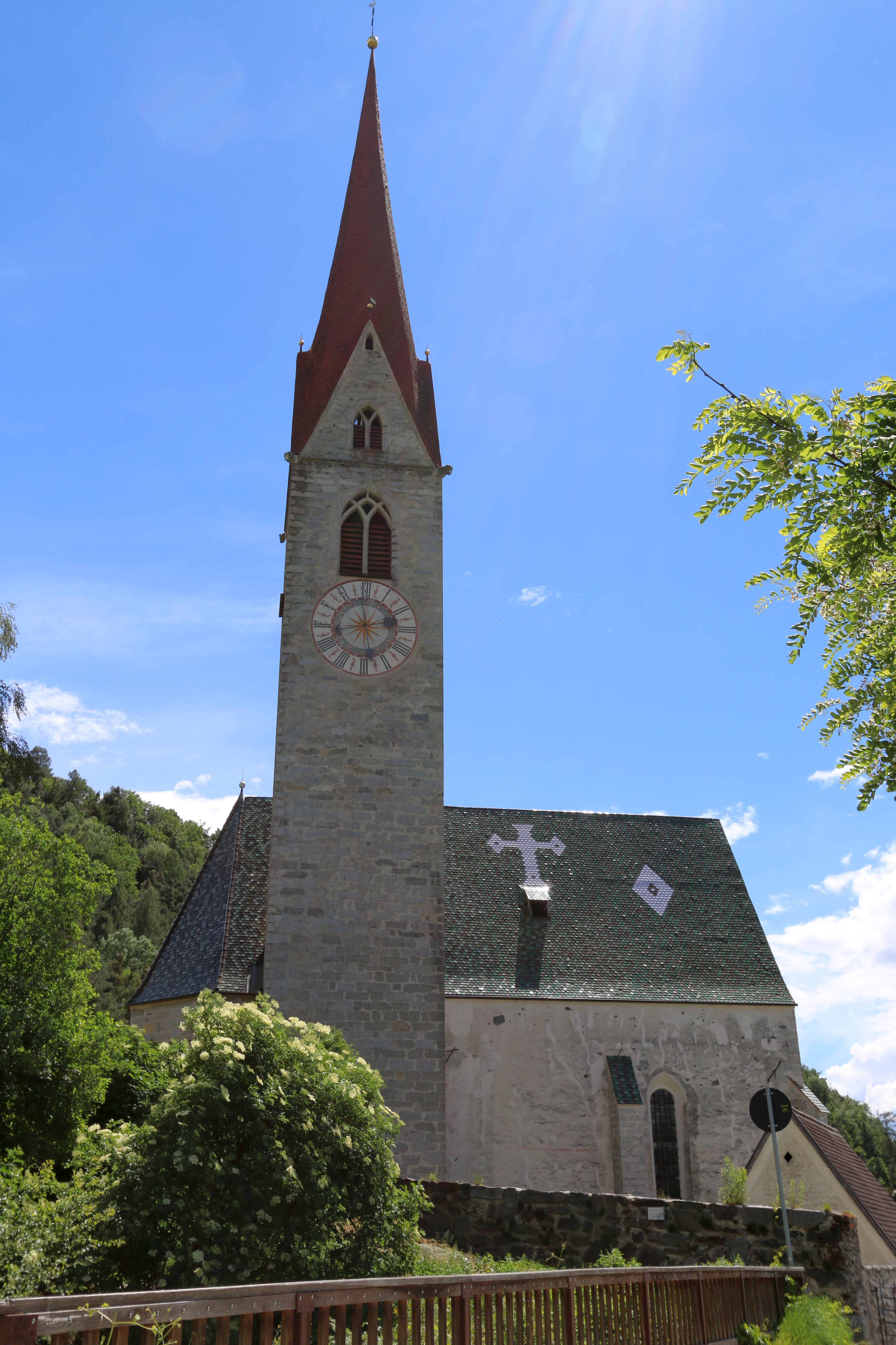 Brixen-Milland, Südtirol: Kirche Maria am Sand